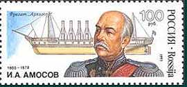 Почтовая марка России - И. А. Амосов, русский кораблестроитель